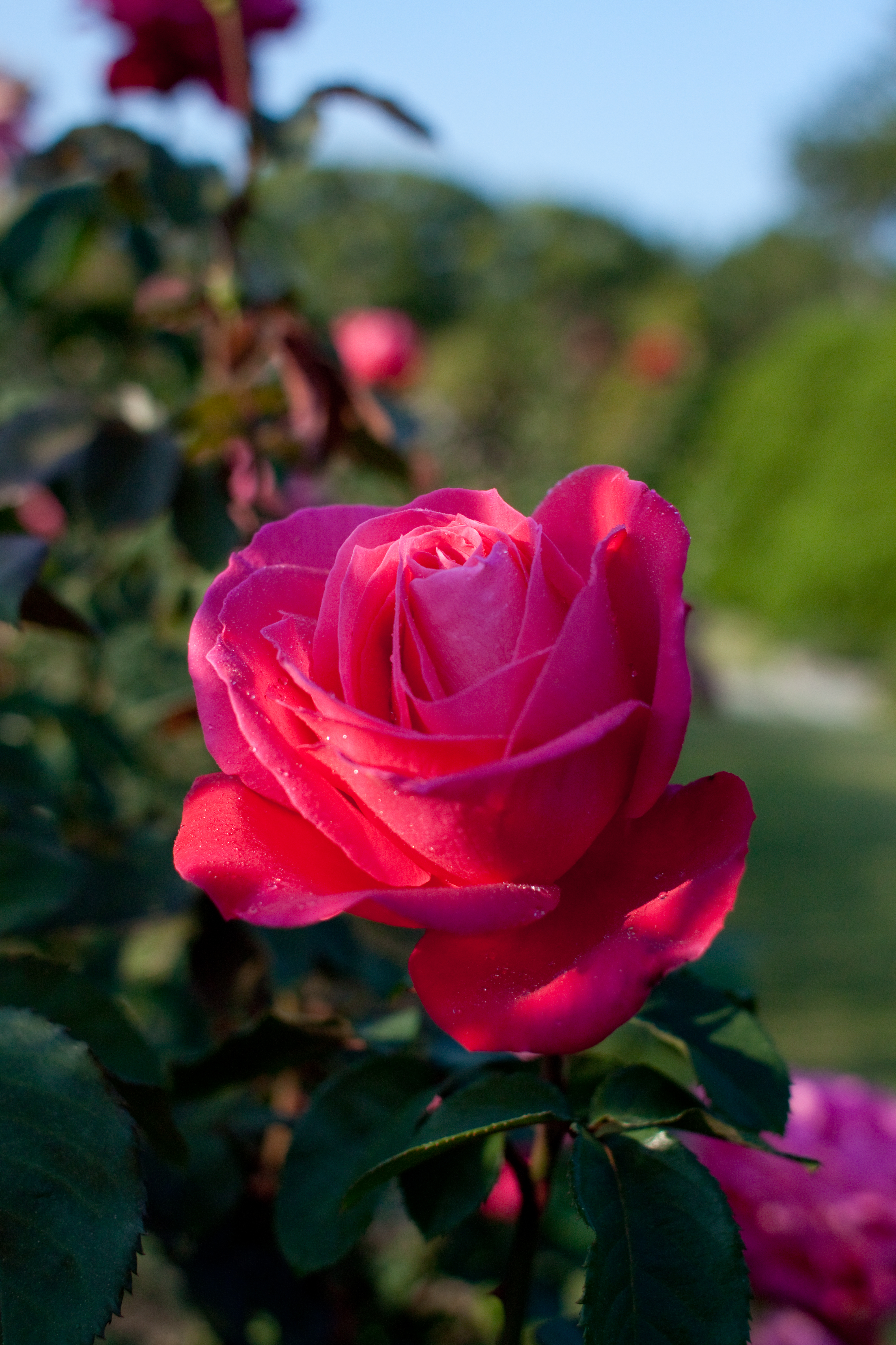 Maria Callas. Rose is dedicated to Maria Callas. マリア・カラス。名前の通りゴージャスな大輪。濃いピンクが色っぽい。